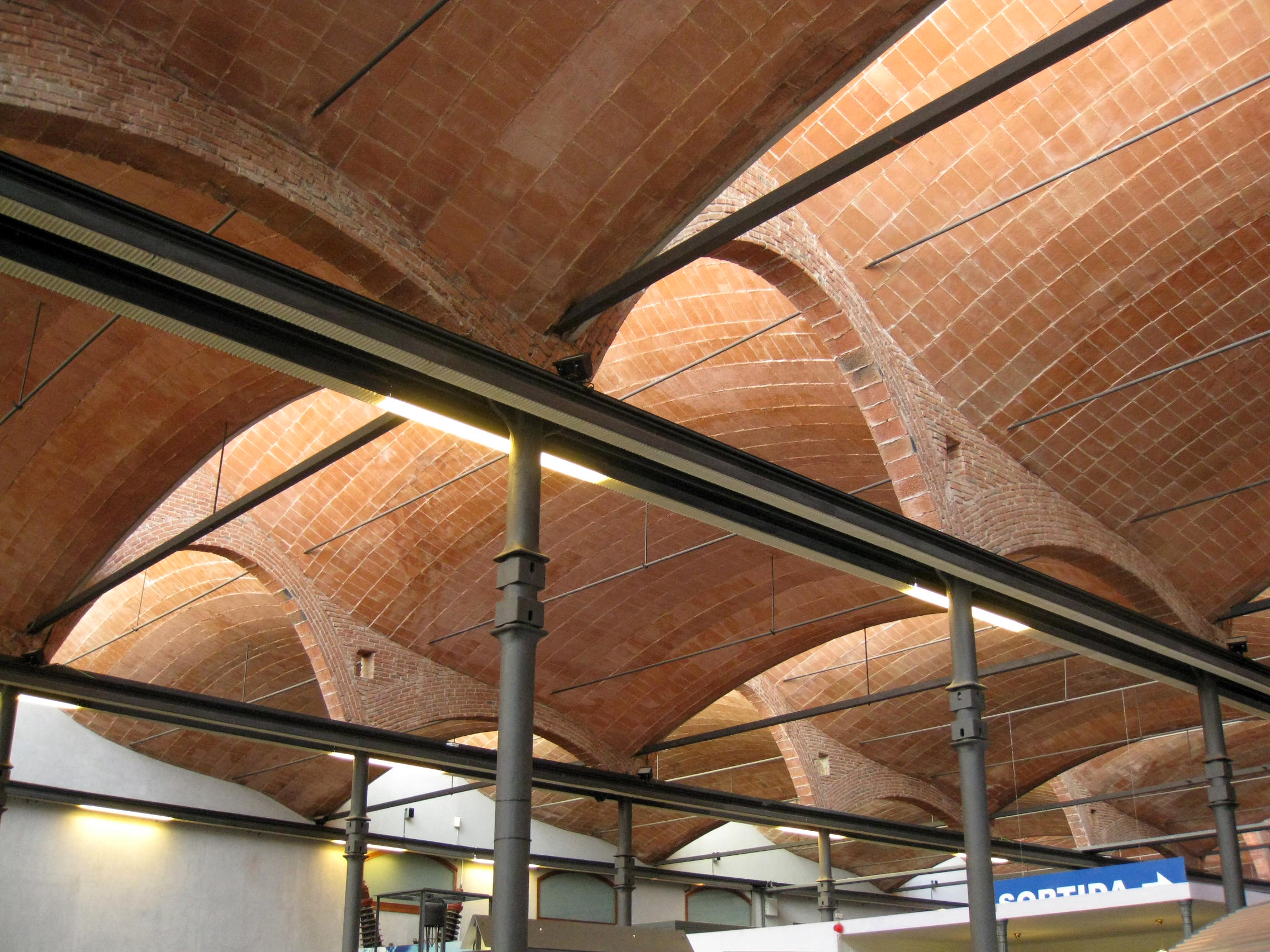 Fàbrica Aymerich, Amat i Jover (Terrassa) Object location41° 33′ 54.49″ N, 2° 00′ 28.14″ E